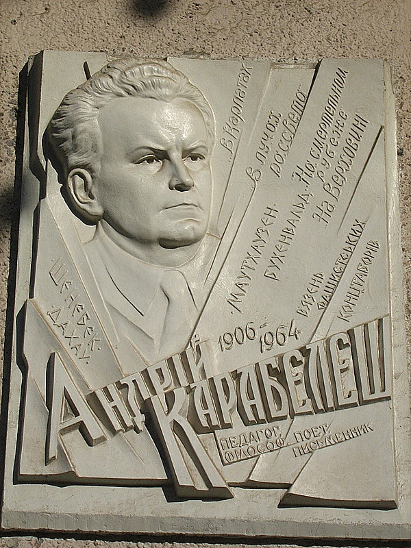 А.В.Карабелеш-мемориальная таблица в г.Свалява